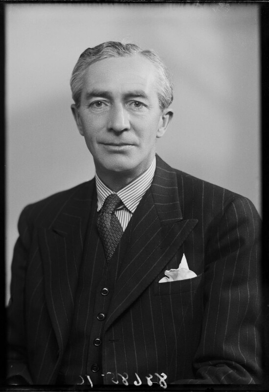 Cyril Lakin